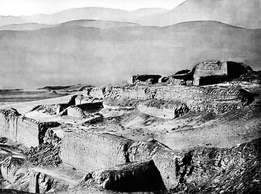 Vista del complejo arqueológico de Pachacámac, hacia 1900.